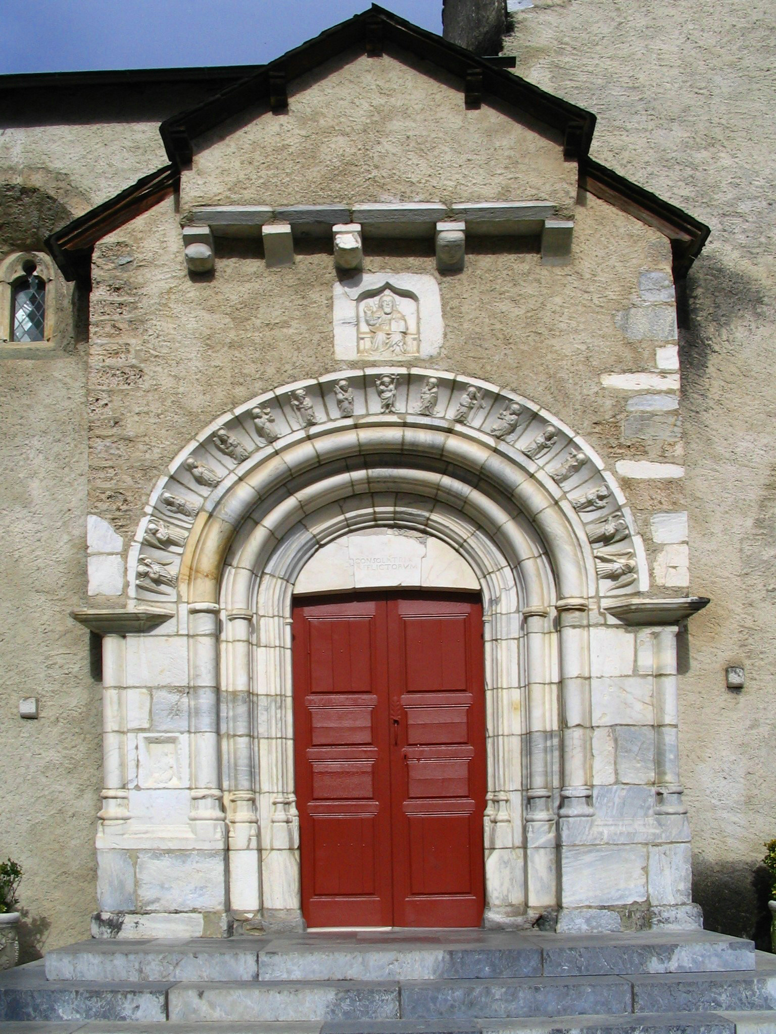 Eglise St Jacques - Béost - Pyrénées Atlantiques France Portail de marbre blanc. Author:P.Charpiat 2007